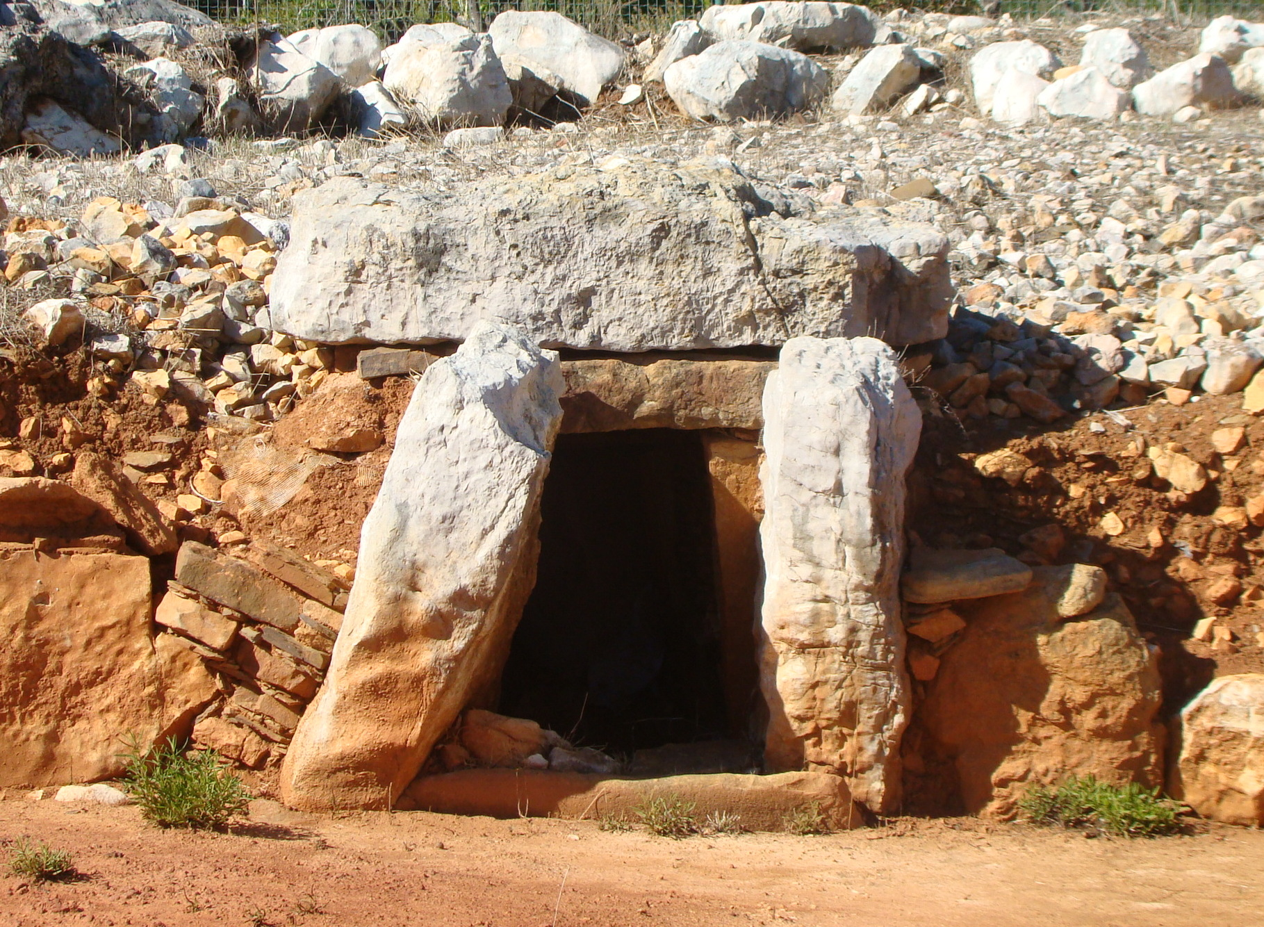 Centro de Alcalar 2017 - Monumento 9 - Entrada